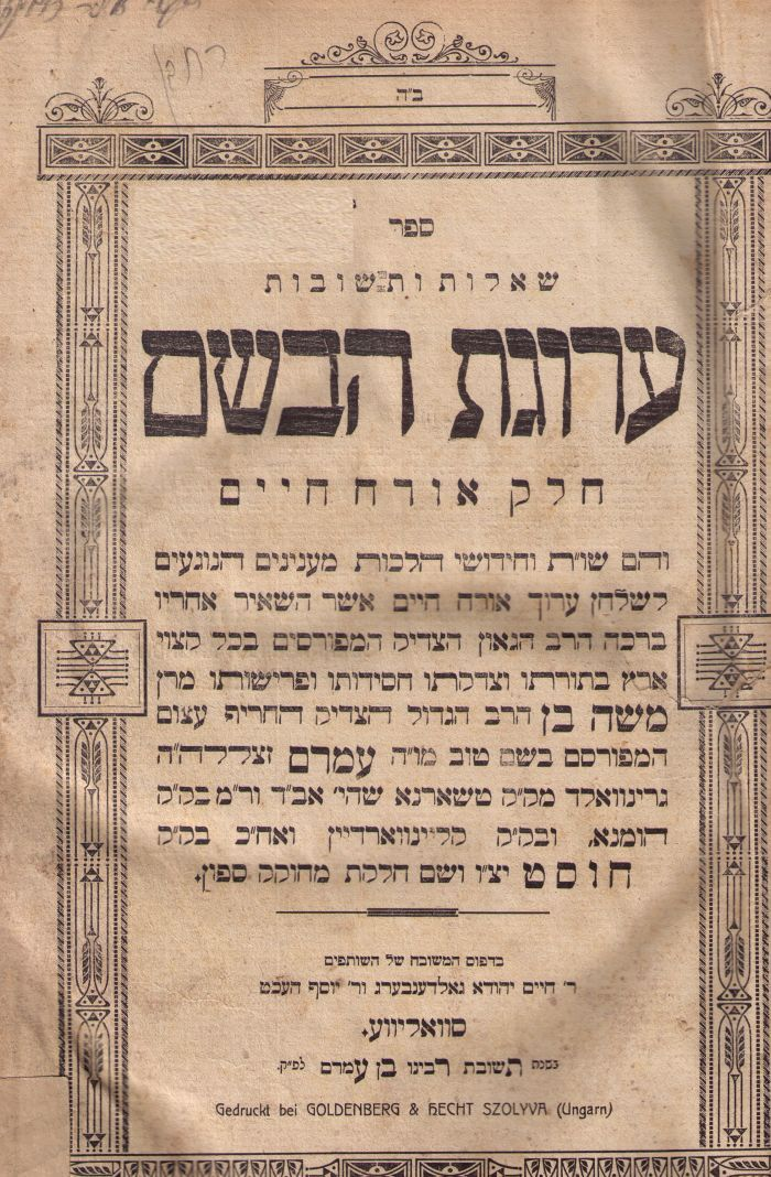 Arugat Habosem Book